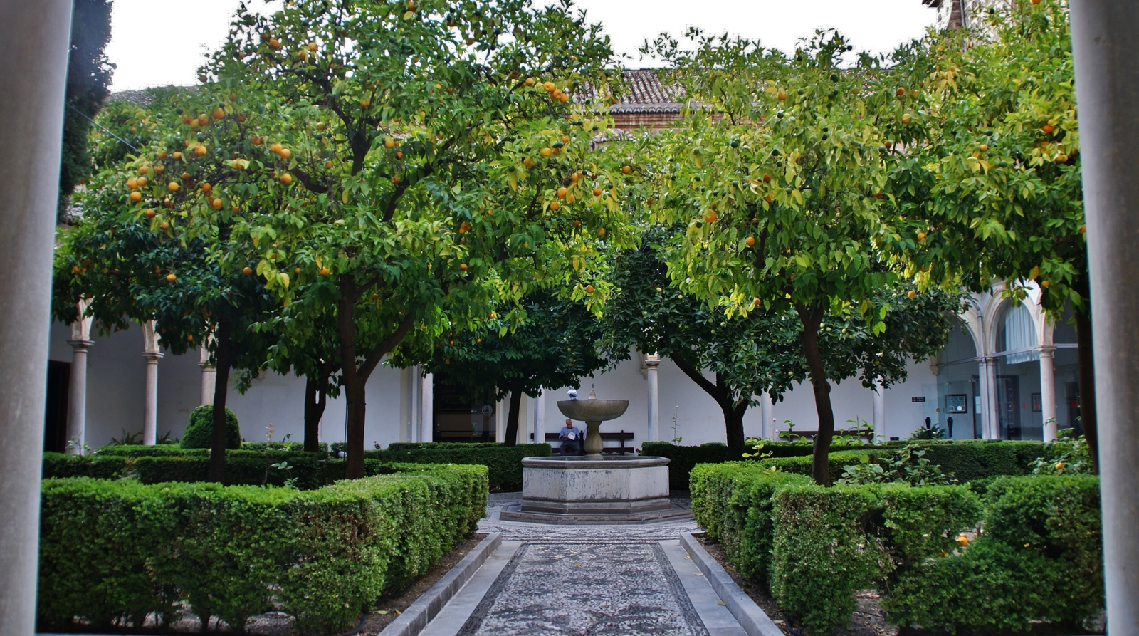 Monasterio de Nuestra Señora de la Asunción, más conocido como la Cartuja de Granada. Se comenzó a construir en el siglo XVI (1506) y su construcción duró 3 siglos, hasta el XIX.